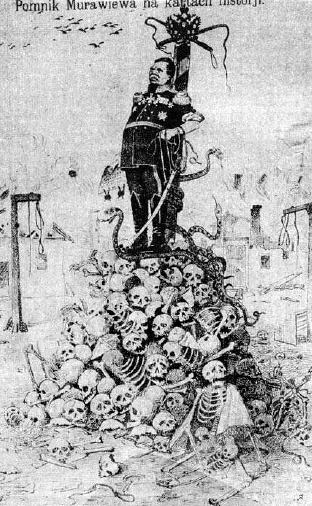 Беларуская (тарашкевіца): Помнік Мураўёву-вешальніку ў Вільні (Vilnia). Карыкатура